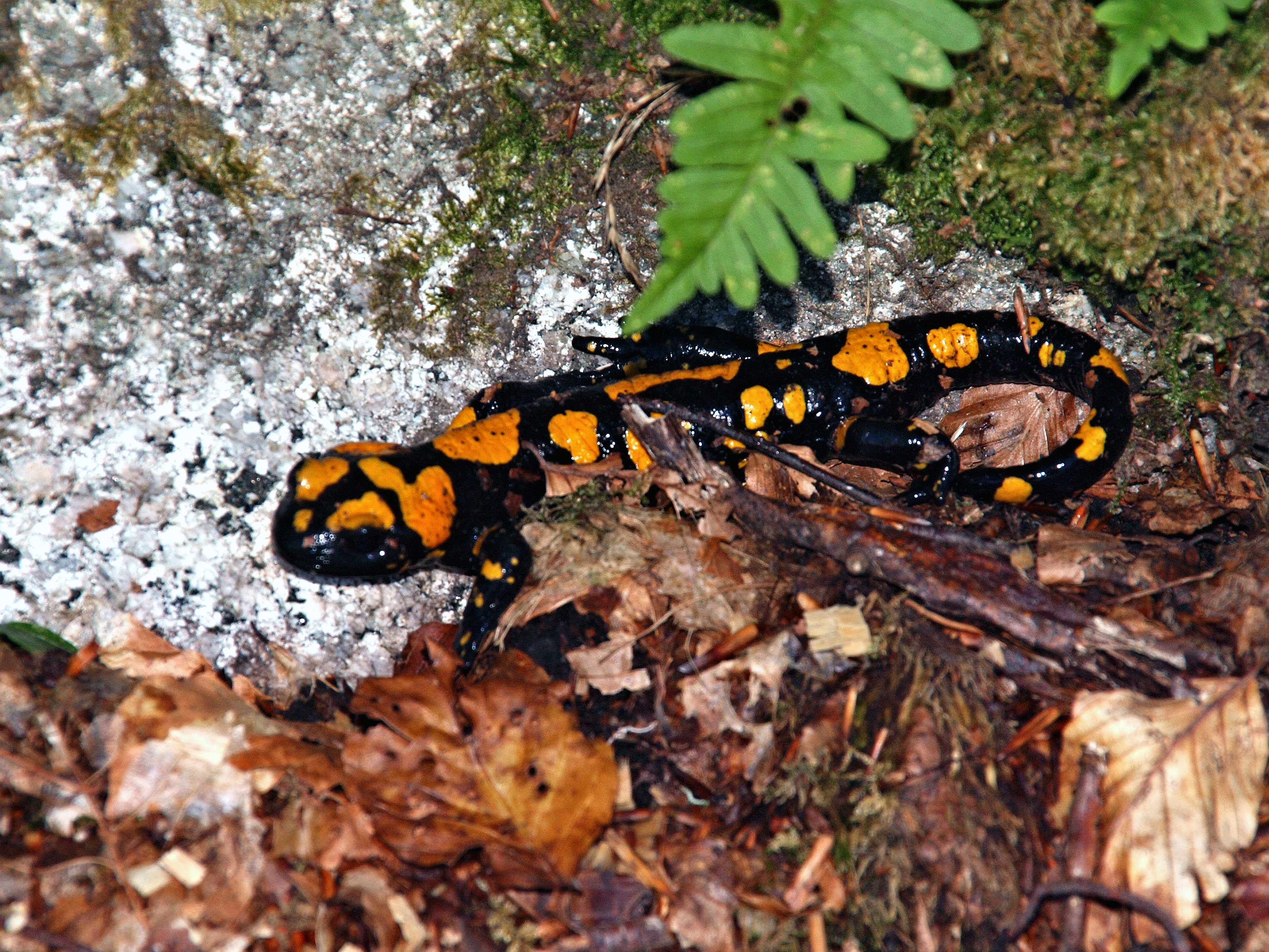 Vivario, Centre Corse (Corse) - Salamandre dans la forêt de Vizzavona